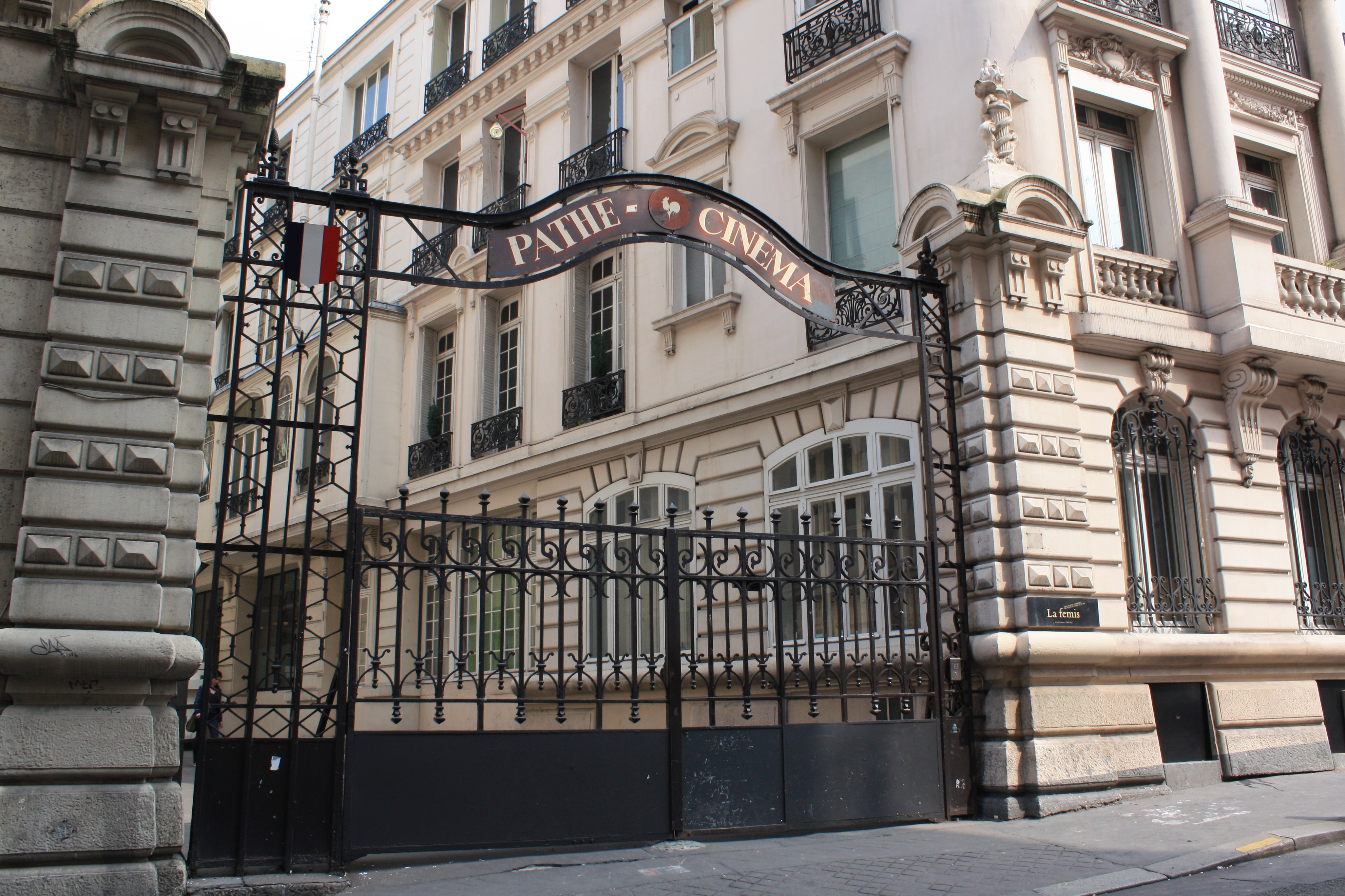 Extérieurs des anciens studios Pathé, où se trouve aujourd'hui l'école de cinéma de la Fémis (voir panneau à droite sur la photo).